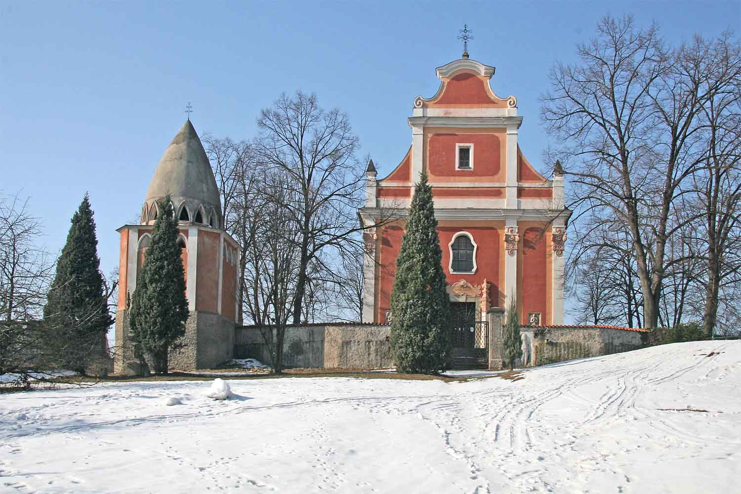 Barokní kostel Svatého Marka v Žehušicích se zvonicí v maurském slohu